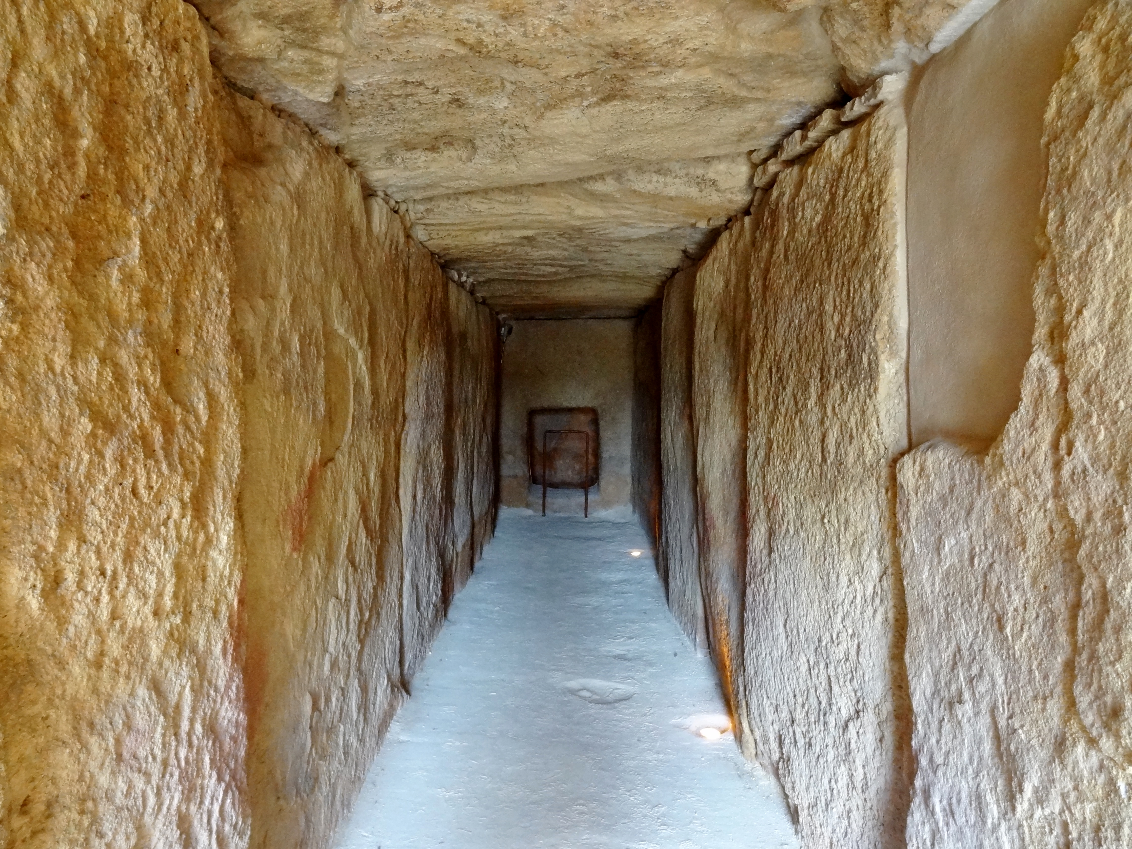 Dolmen de Viera in Antequera, Provinz Málaga, Spanien